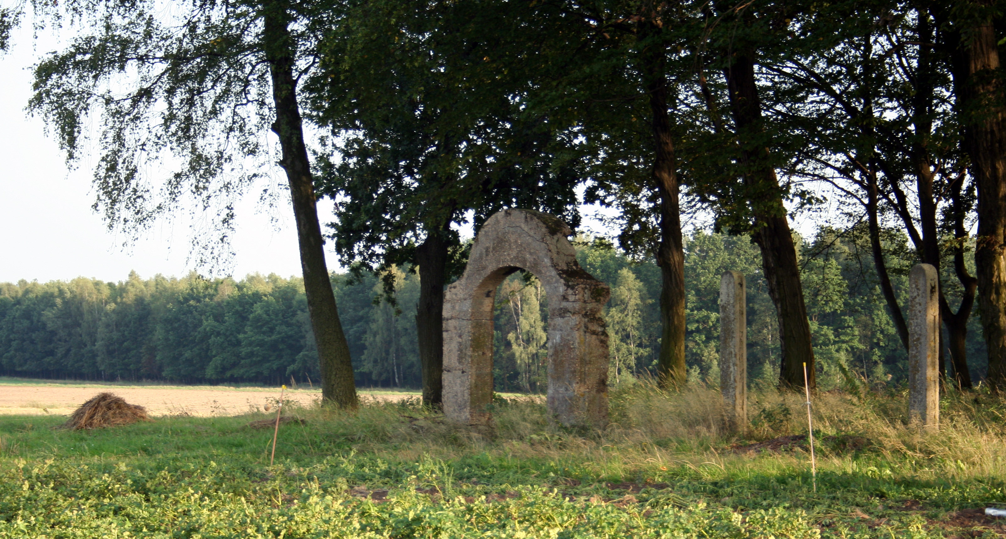 brama na cmentarzu żydowskim w Cieszowej, powiat lubliniecki